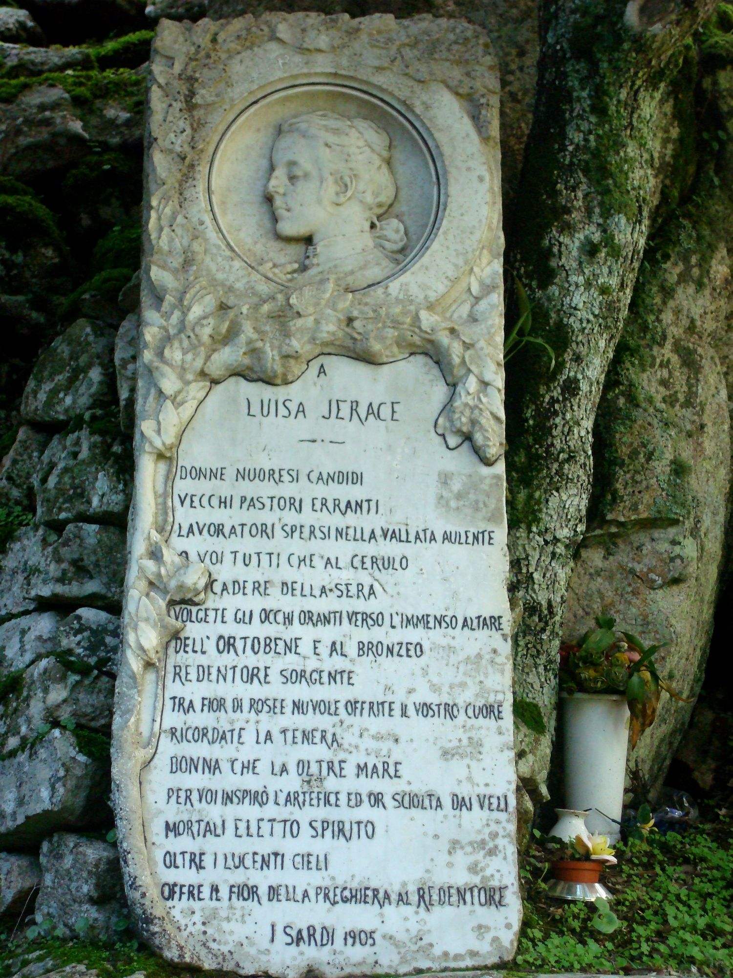 Lapide ai piedi della formazione rocciosa sulla quale è collocata la statua del Redentore dello scultore Vincenzo Jerace, dedicata alla moglie dell'artista, Luisa Pompeani Jerace, deceduta mentre il marito lavorava per terminare il monumento.